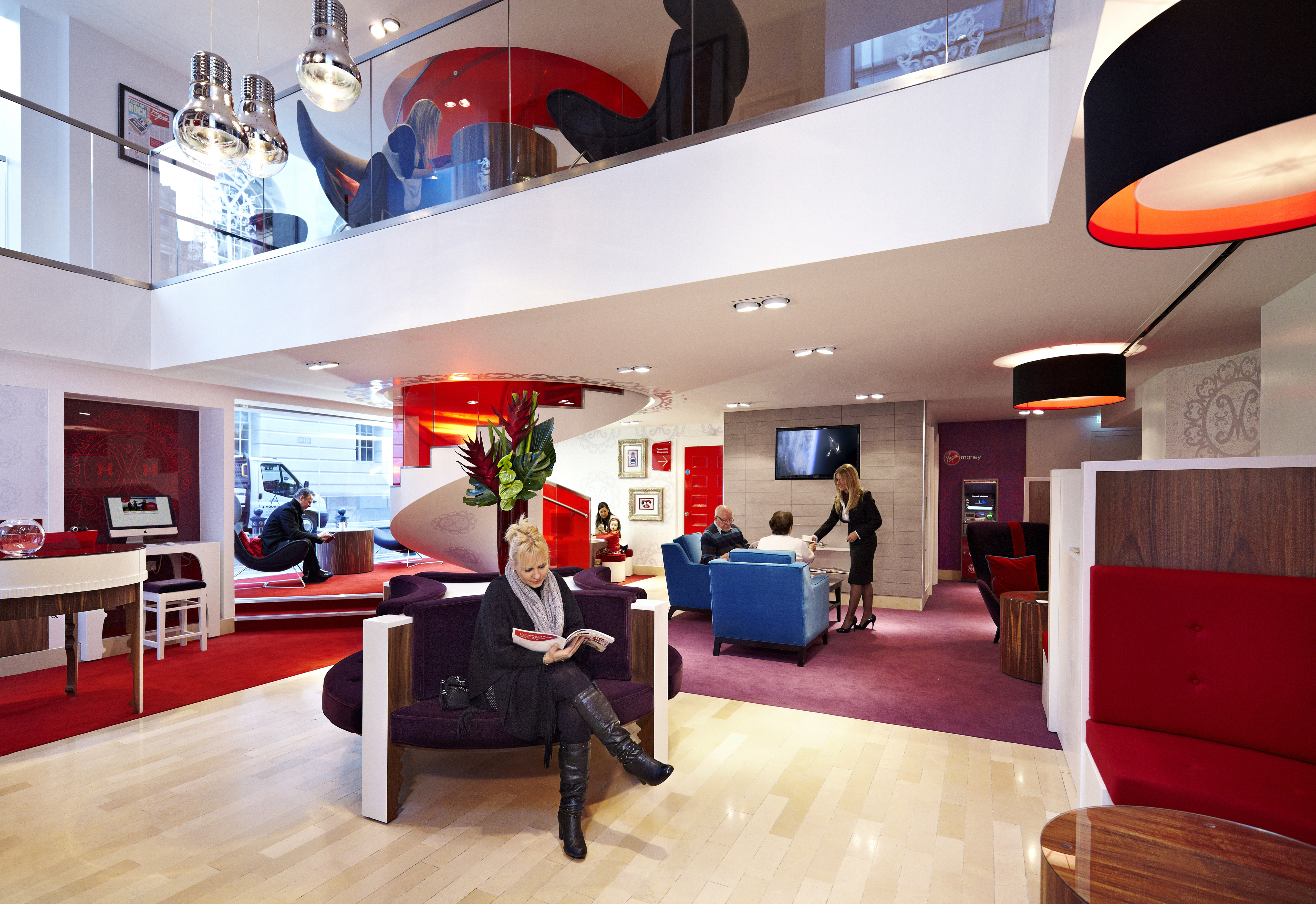 Virgin Money Manchester Lounge